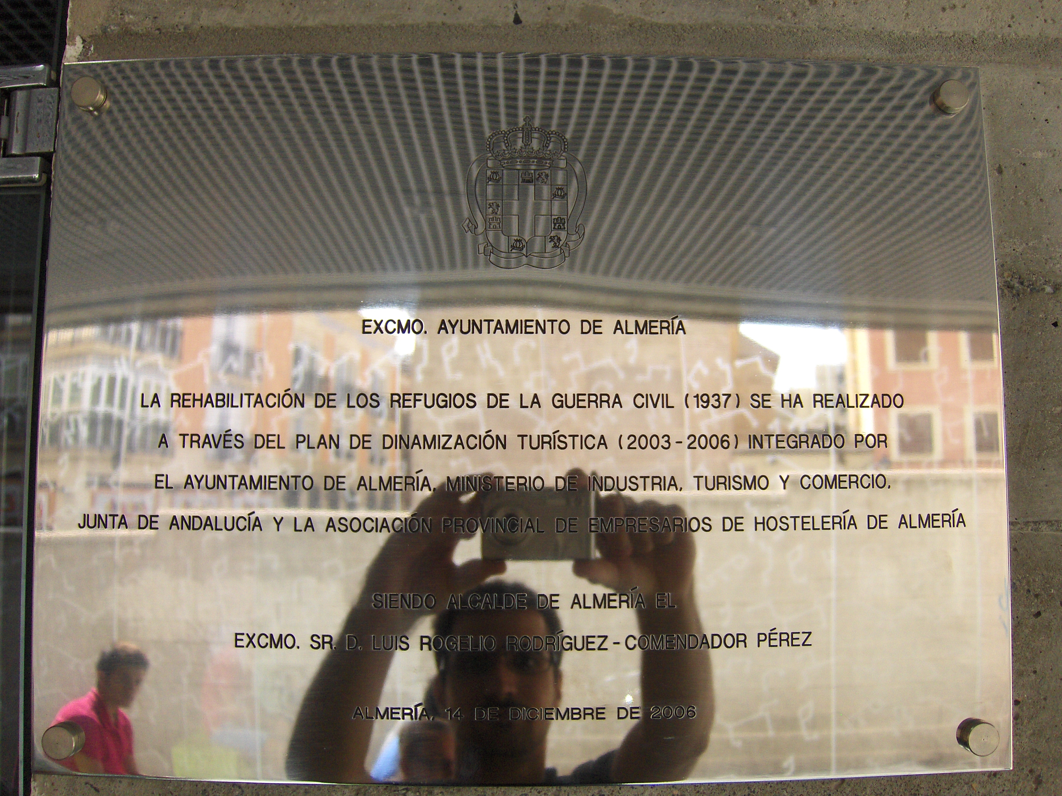 Placa conmemorativa de la apertura de los refugios de Almería